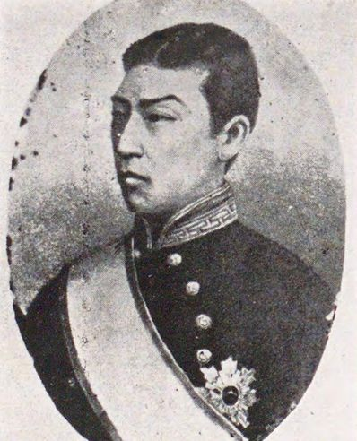 篠原国幹（1837-1977）